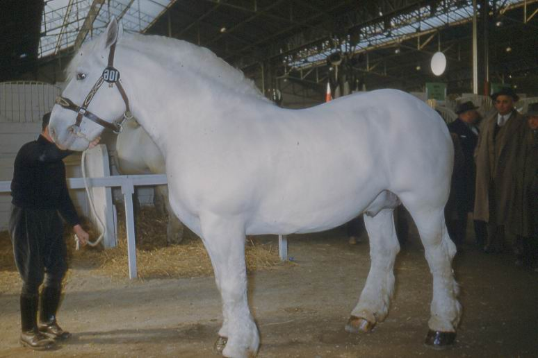 Chevaux boulonnais Concours Général de l'Agriculture de Paris, Parc des Expositions de la Porte de Versailles, 1960 (devenu depuis le Salon International de l'Agriculture)